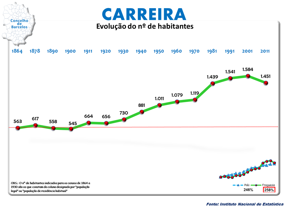 Censos 1864/2011